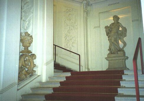 Liechtenstein